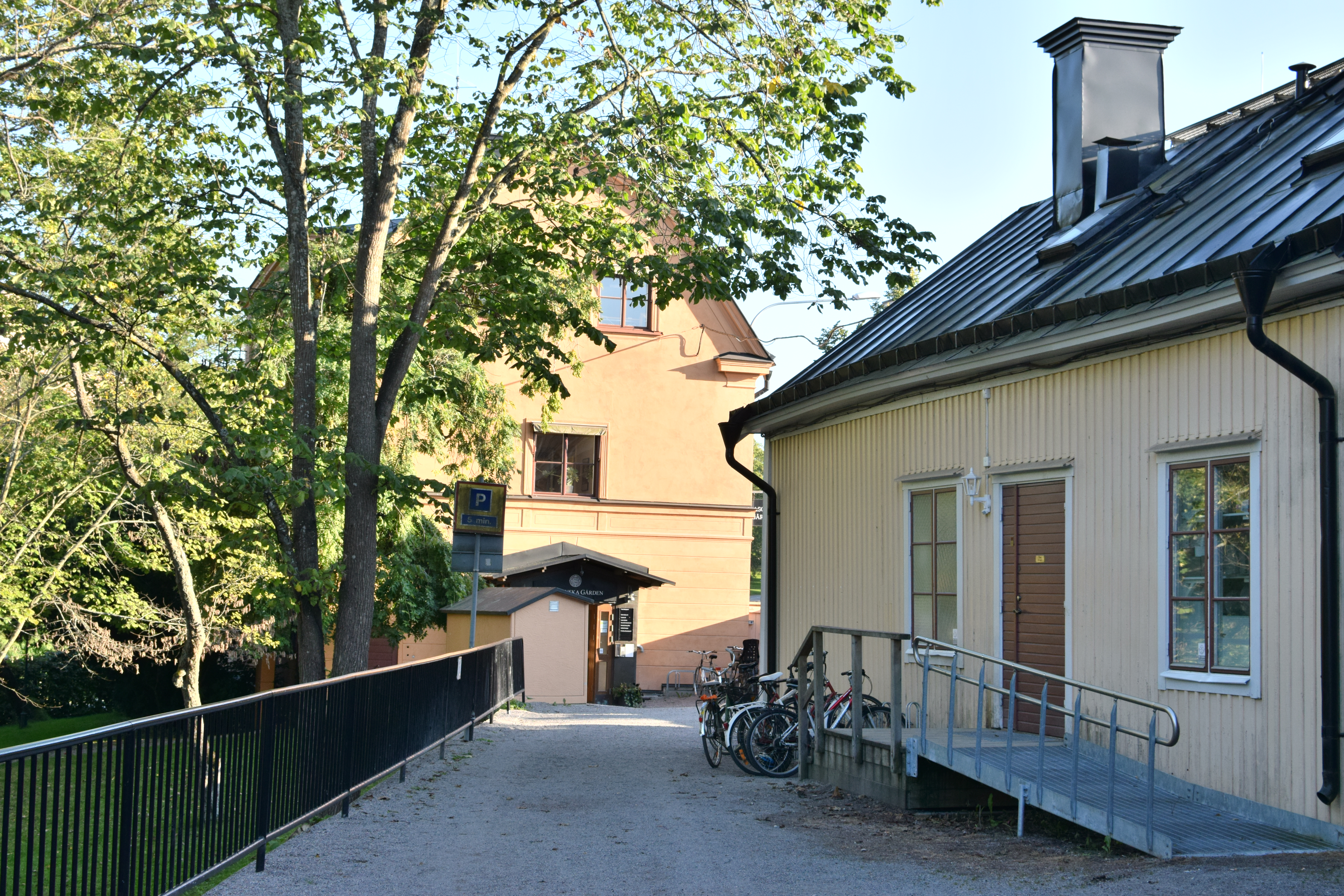 Jontes stuga till höger, Clasonska gården och träd i Odinslund till vänster. Övre Slottsgatan 3, Uppsala